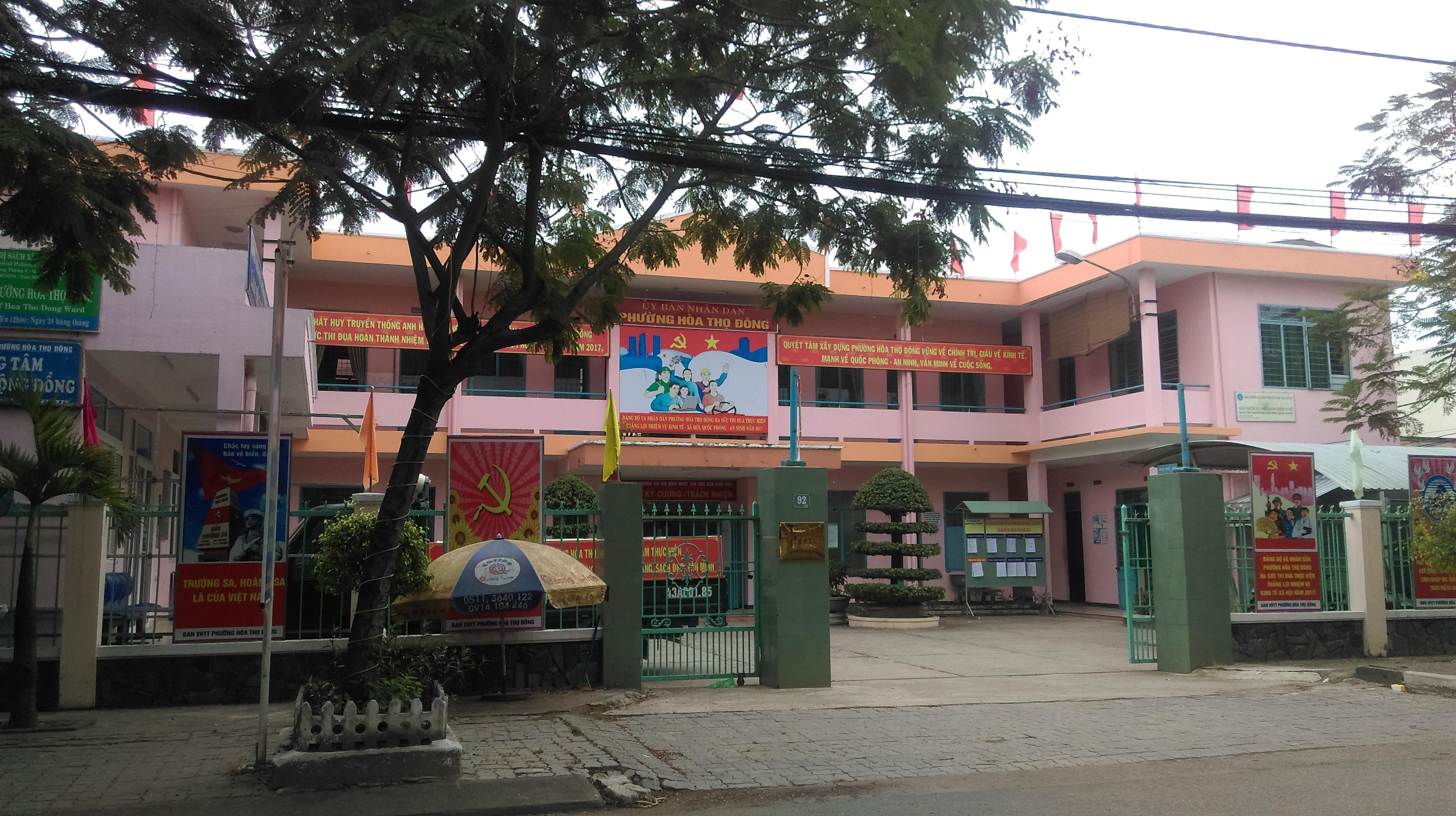 UBND phường Hòa Thọ Đông